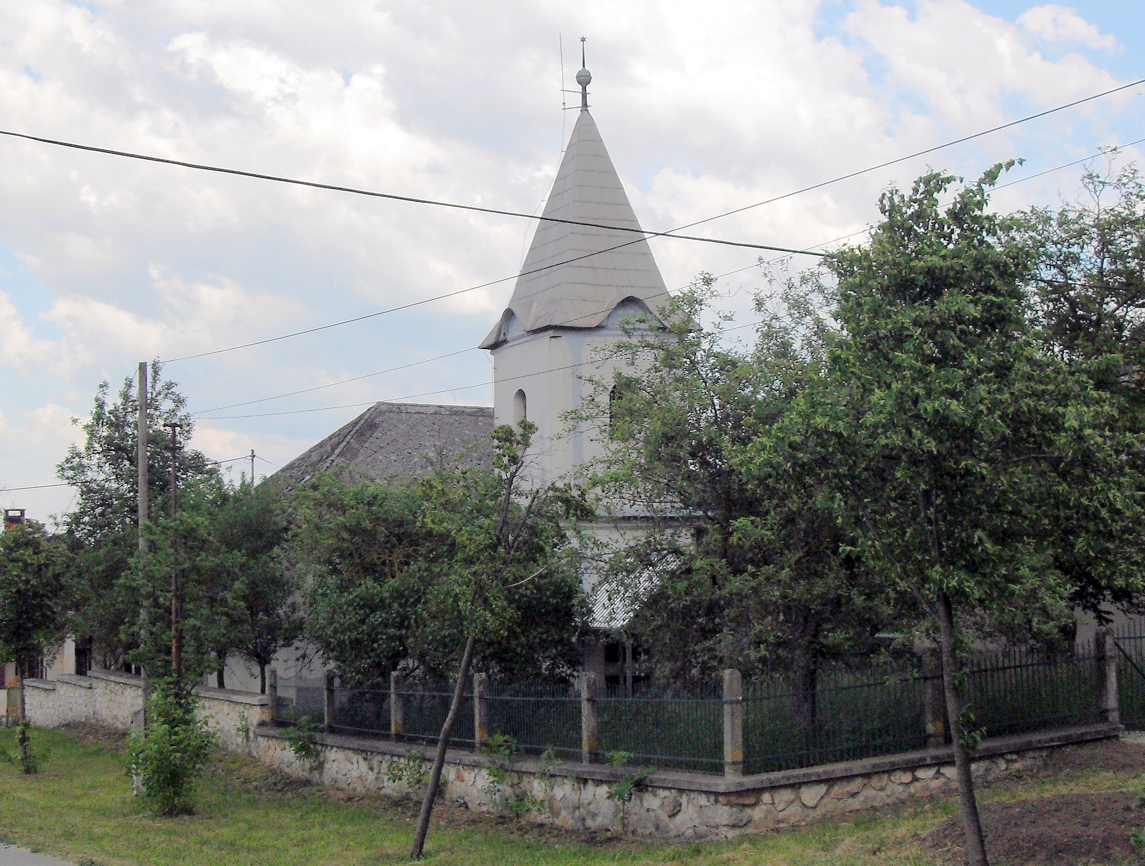 Dedin kostol v Včelára